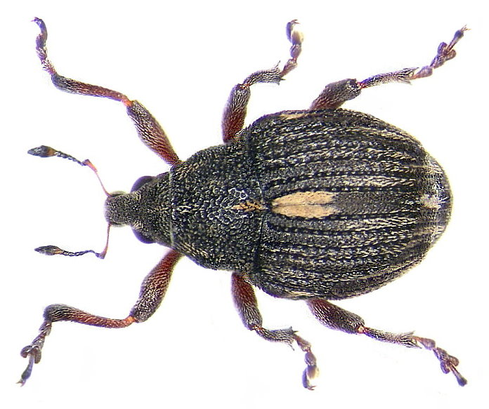 Familie: Curculionidae Groesse: 2,5-3,4 mm Verbreitung: palaearktisch Ökologie: an Rumex-Arten Fundort: Germania, Bayern, Oberfranken, Selbitz leg.det. U.Schmidt, 2004 Foto: U.Schmidt, 2005